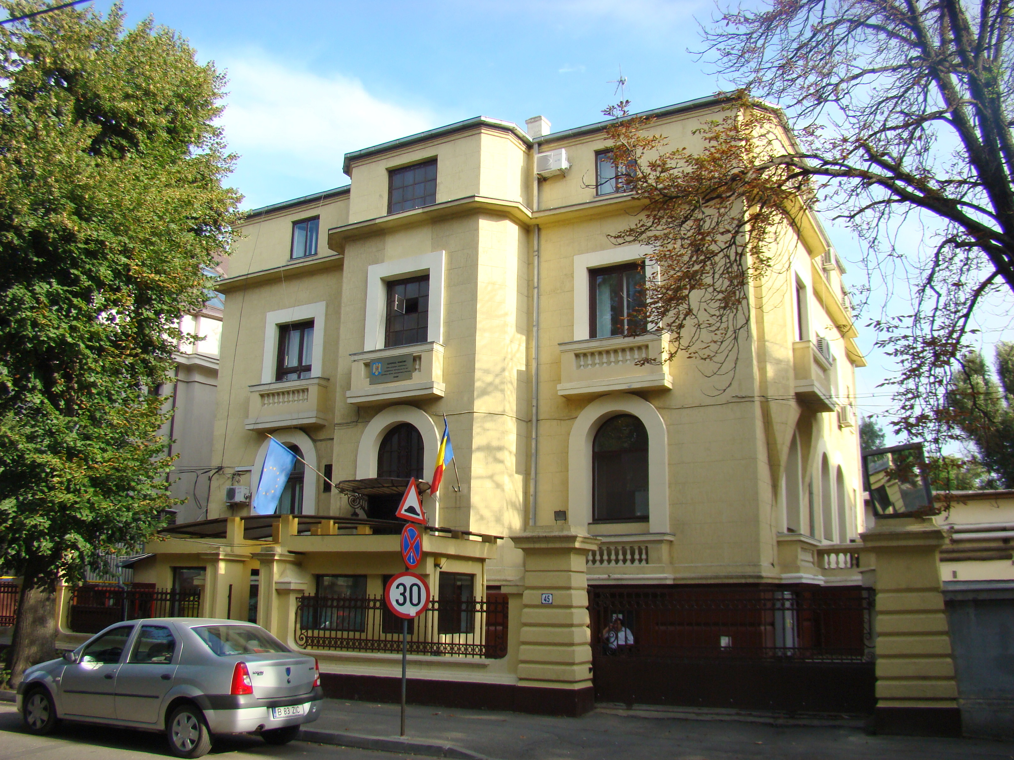 Casă monument istoric, str. Aleea Alexandru, nr. 45 (în prezent sediu al Regiei Autonome Administrația Patrimoniului Protocolului de Stat)